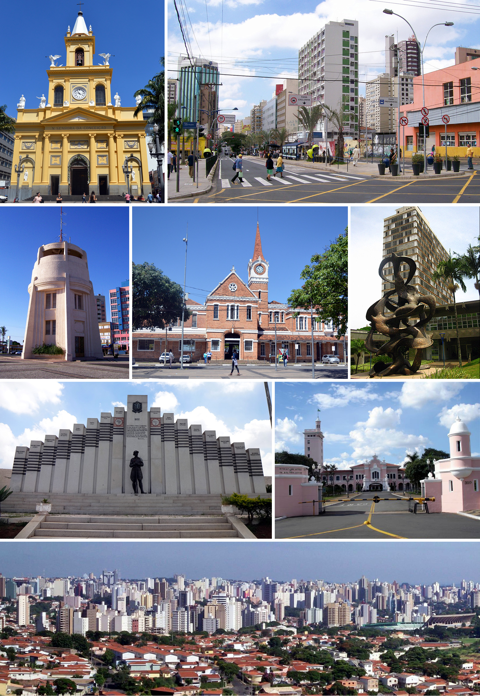 Montagem de fotos da cidade de Campinas, Brasil. Do alto, da esquerda para a direita: Catedral Metropolitana de Campinas,Estação de Transferência Moraes Sales, Torre do Castelo, Estação Cultura, Palácio dos Jequitibás sede da prefeitura municipal, Monumento aos Heróis da Revolução Constitucionalista de 1932 no Cemitério da Saudade, Escola Preparatória de Cadetes do Exército e visão geral do centro da cidade.